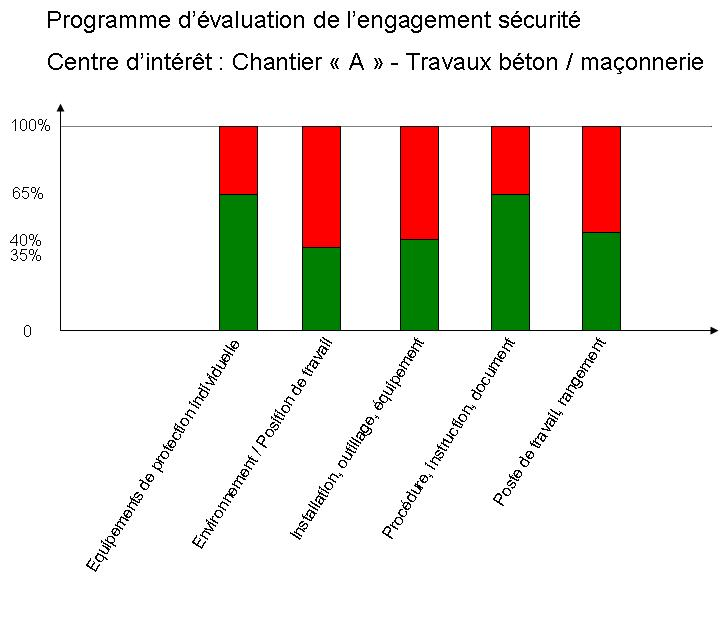 Représentation résultats évaluation management sécurité